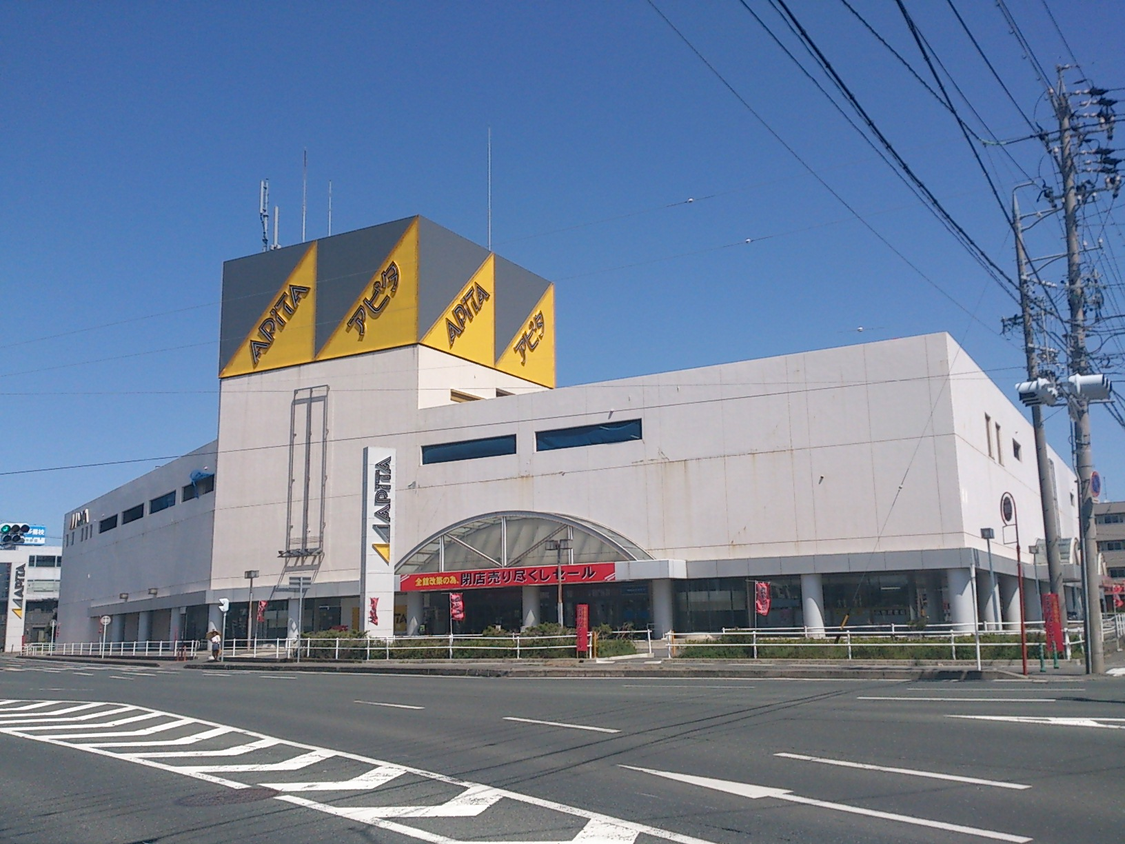 アピタ初生店店舗外観